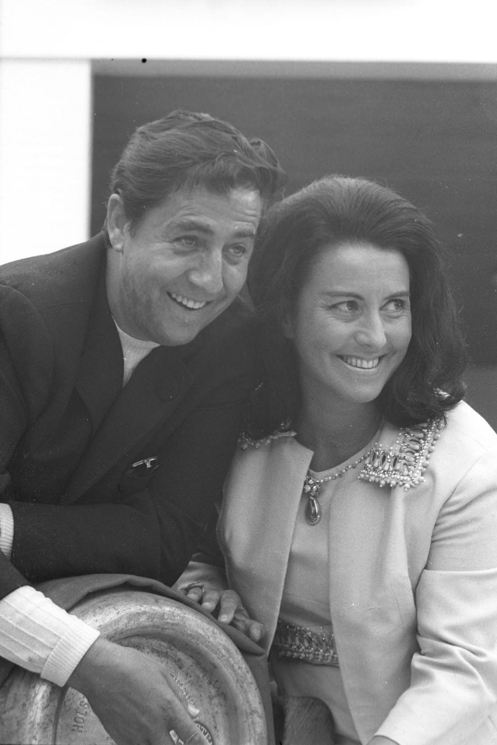 Während der Aufzeichnung der Fernsehsendung "Der goldene Schuss" in der Ostseehalle.